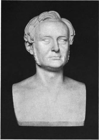 Byste av Peter Andreas Munch utført av Ole Fladager.